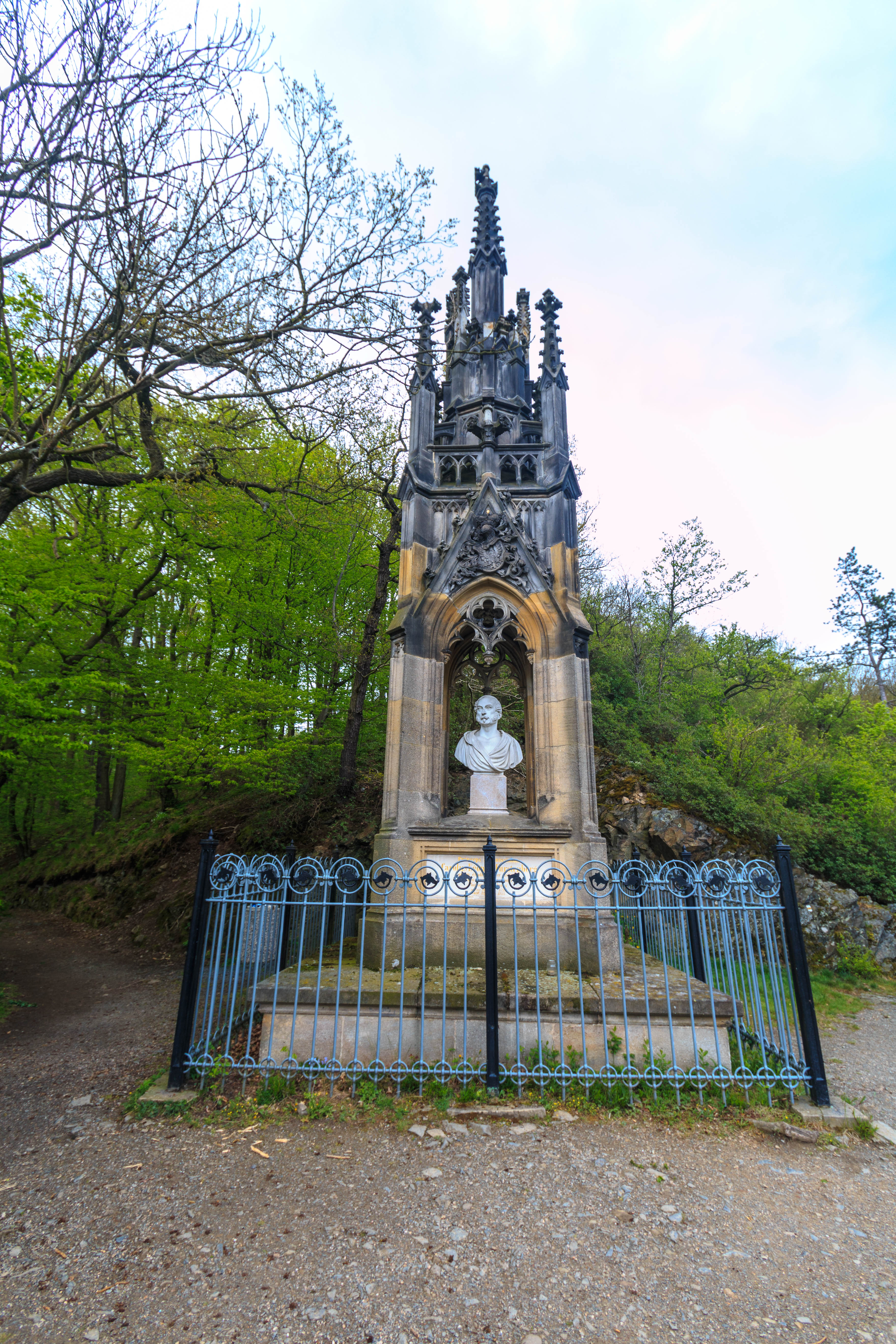 Pomník Karla Egona Fürstenbergra, na vyhlídce jihovýchodně od hradu, pp. 188/6, Křivoklát (městys). Project: Chráněná území